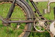 Aanfietsketting van een Alcyon 2 pk uit 1906. De aandrijving vond aan de linkerkant via een (hier niet aanwezige) riem plaats.